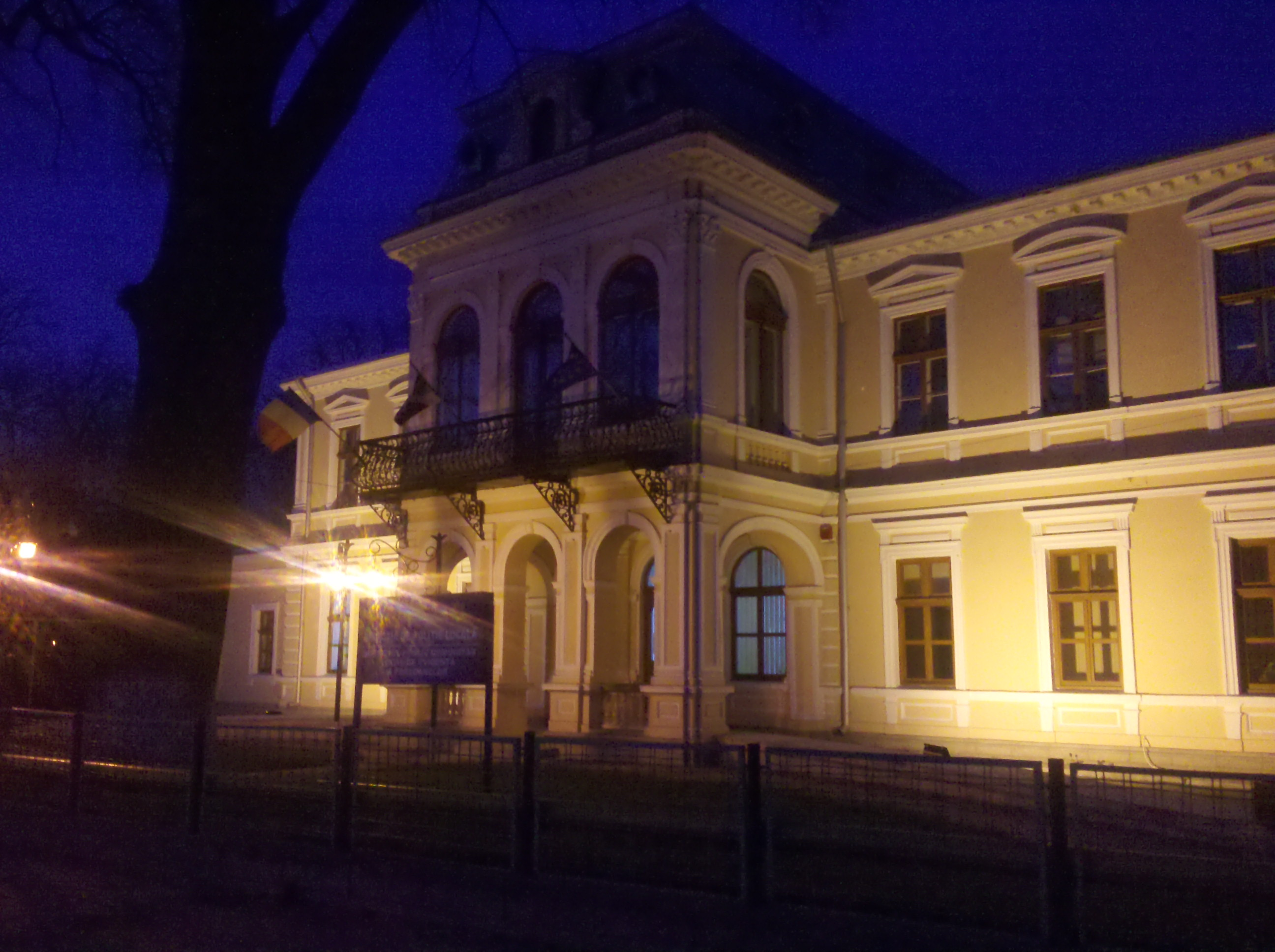 el club